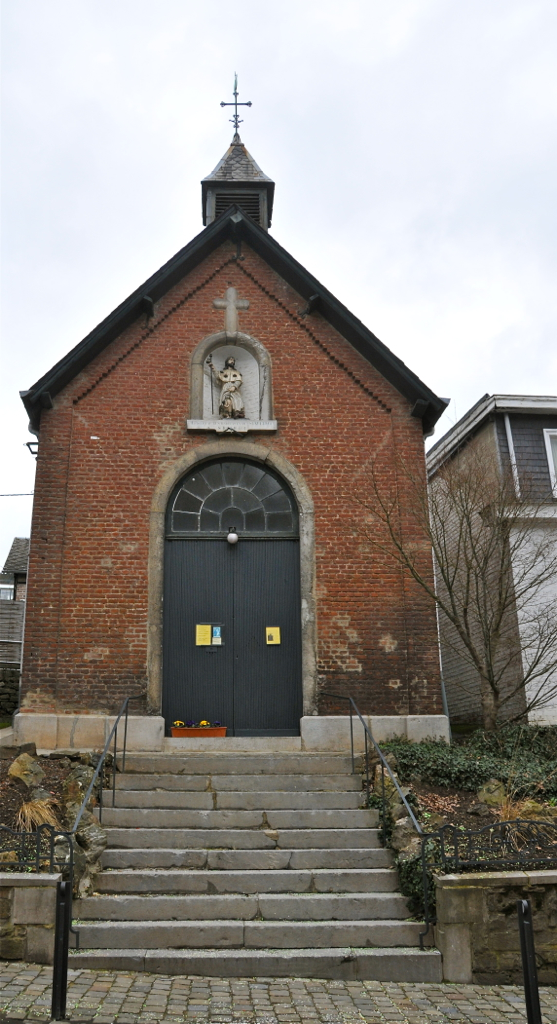 'Kapel' Place Capitaine Lespagnard Werbomont